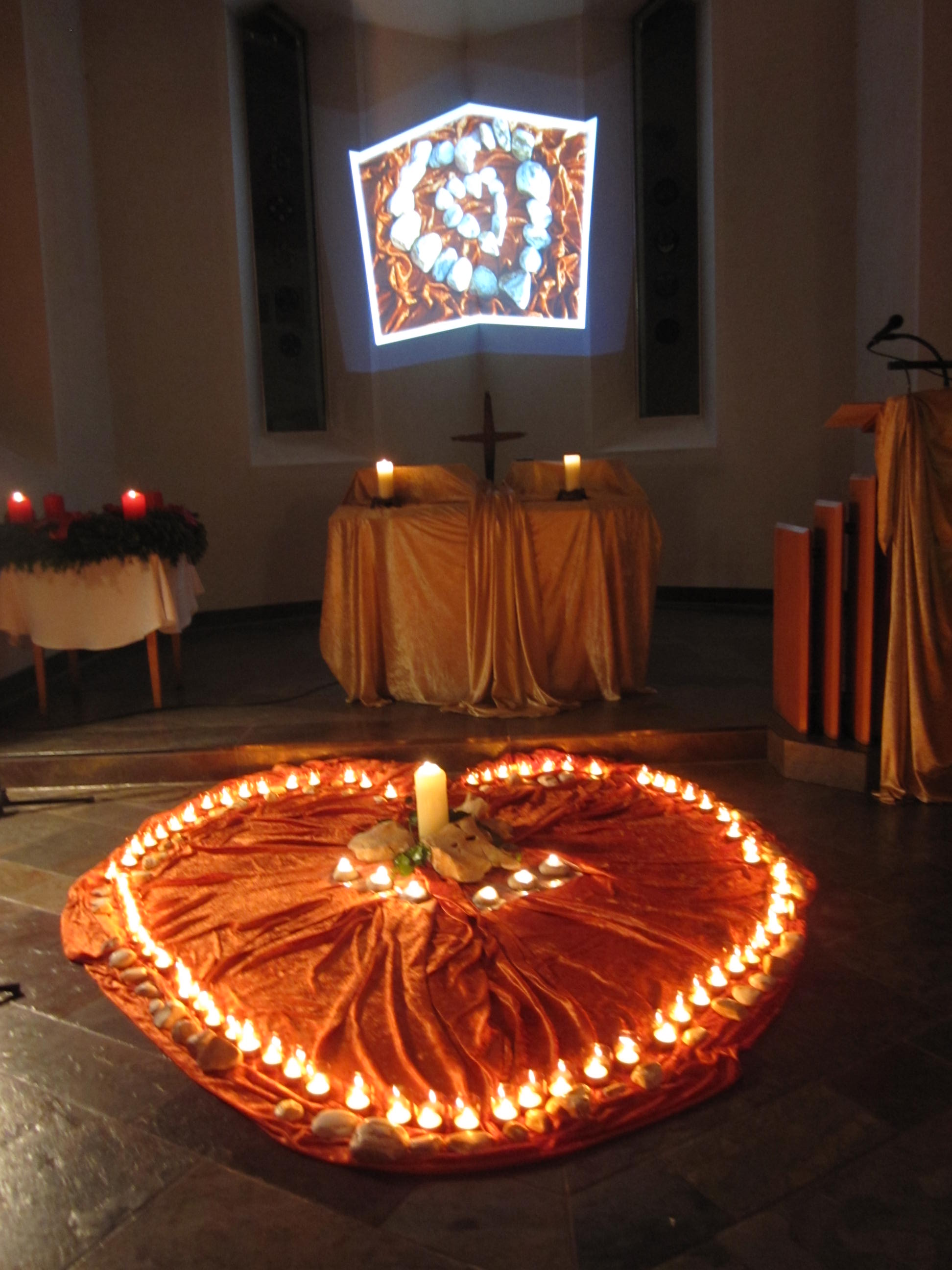 Gedenkfeier "Leere Wiege" am 8. Dezember 2013 in der Lukaskirche Landau